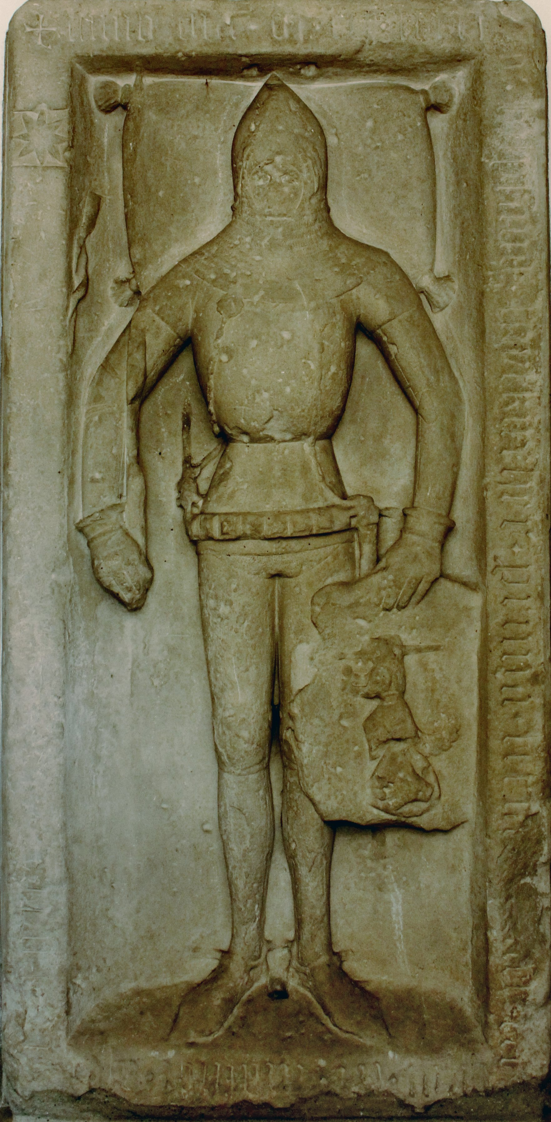 Tumbaplatte des Ritters Hilprand aus dem Geschlecht der Taufkircher in der Pfarrkirche St. Johannes der Täufer in Taufkirchen, Oberbayern.